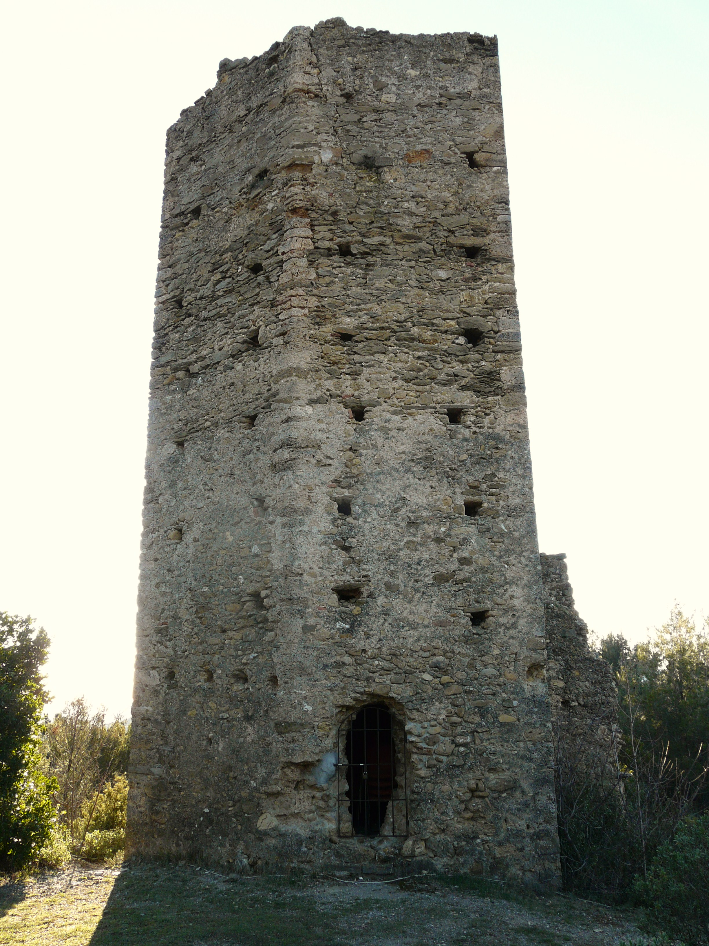 Castellaro, Vendone, Liguria, Italia